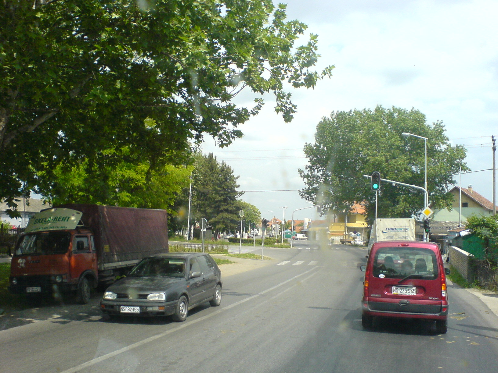 Футог.